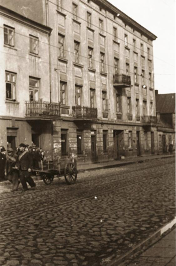 Litzmannstadt Ghetto - kamienica przy ul. Brzezińskiej 56 (ob. Wojska Polskiego 56). Źródło